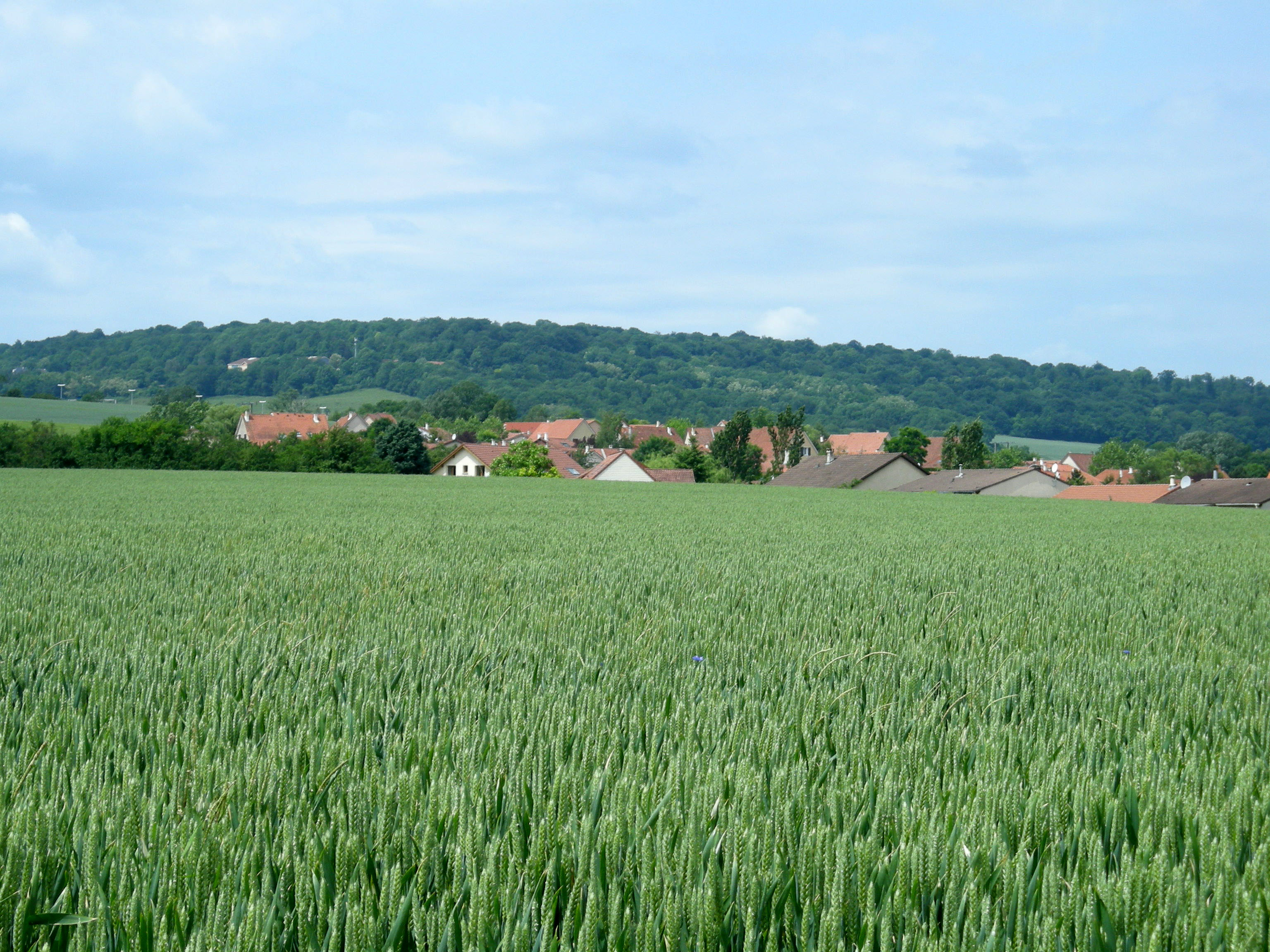 Champs autour de Fléville-devant-Nancy (Meurthe-et-Moselle)